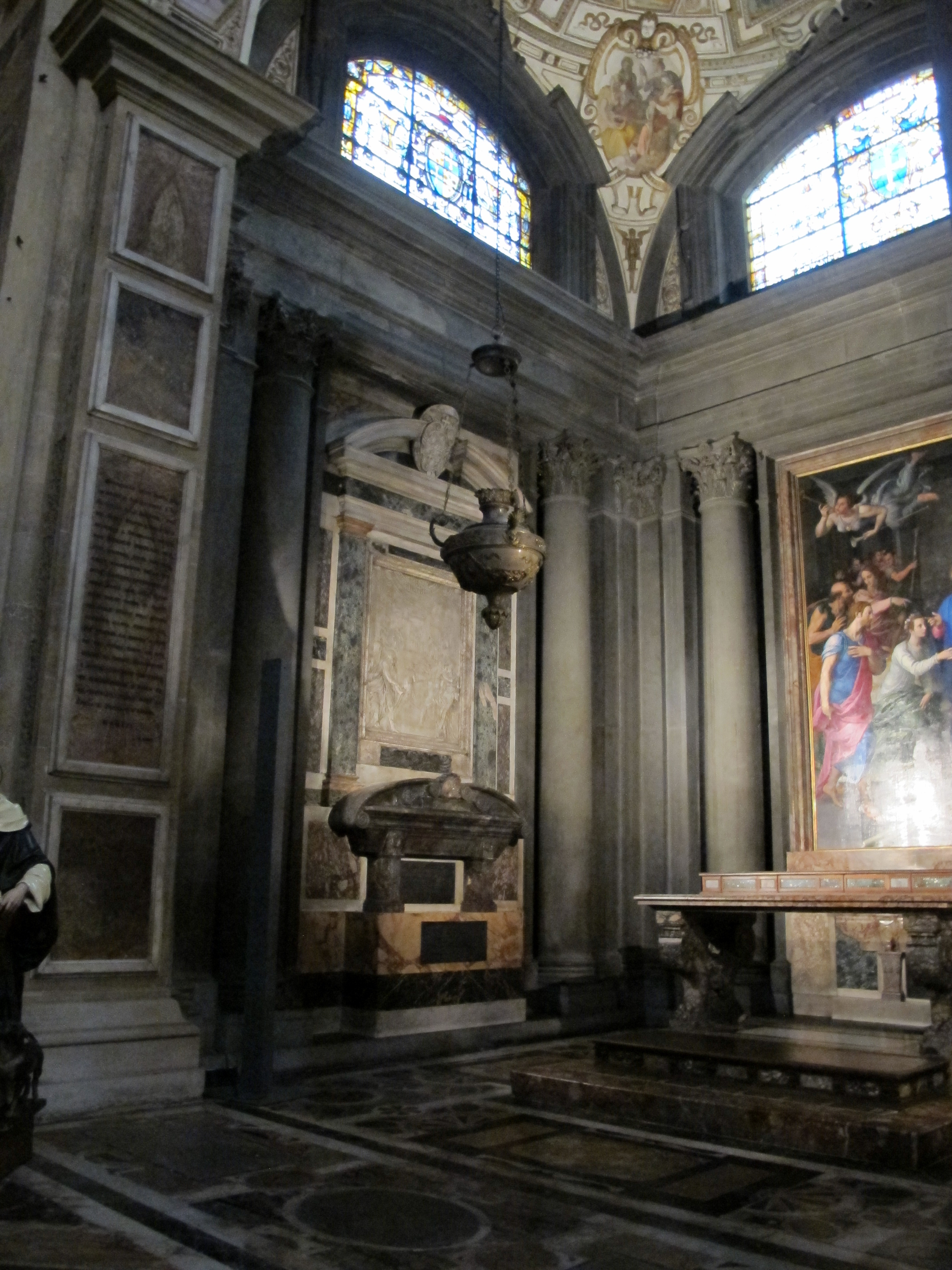 Cappella gaddi di smn 03 tomba del cardinale niccolò gaddi, con sposal. vergine di giovanni bandini (1576-77)